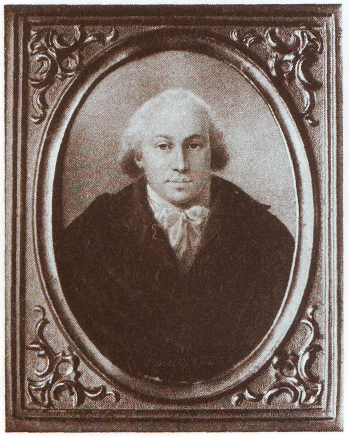 Александр Петрович Ермолов (1754-1843)